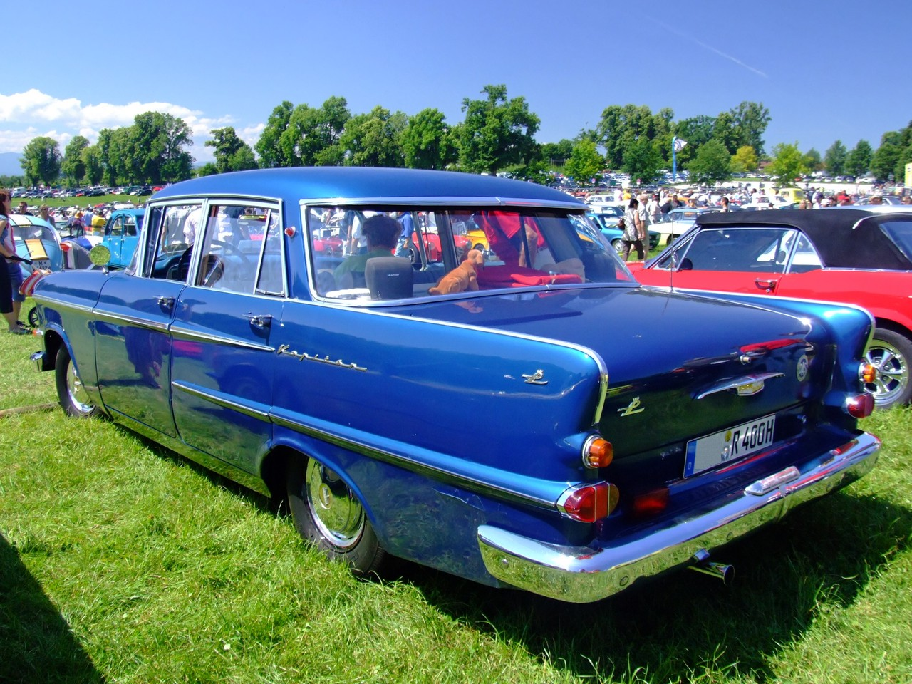 Quelle: selbst fotografiert, 06/2007 Fotograf: Späth Chr.